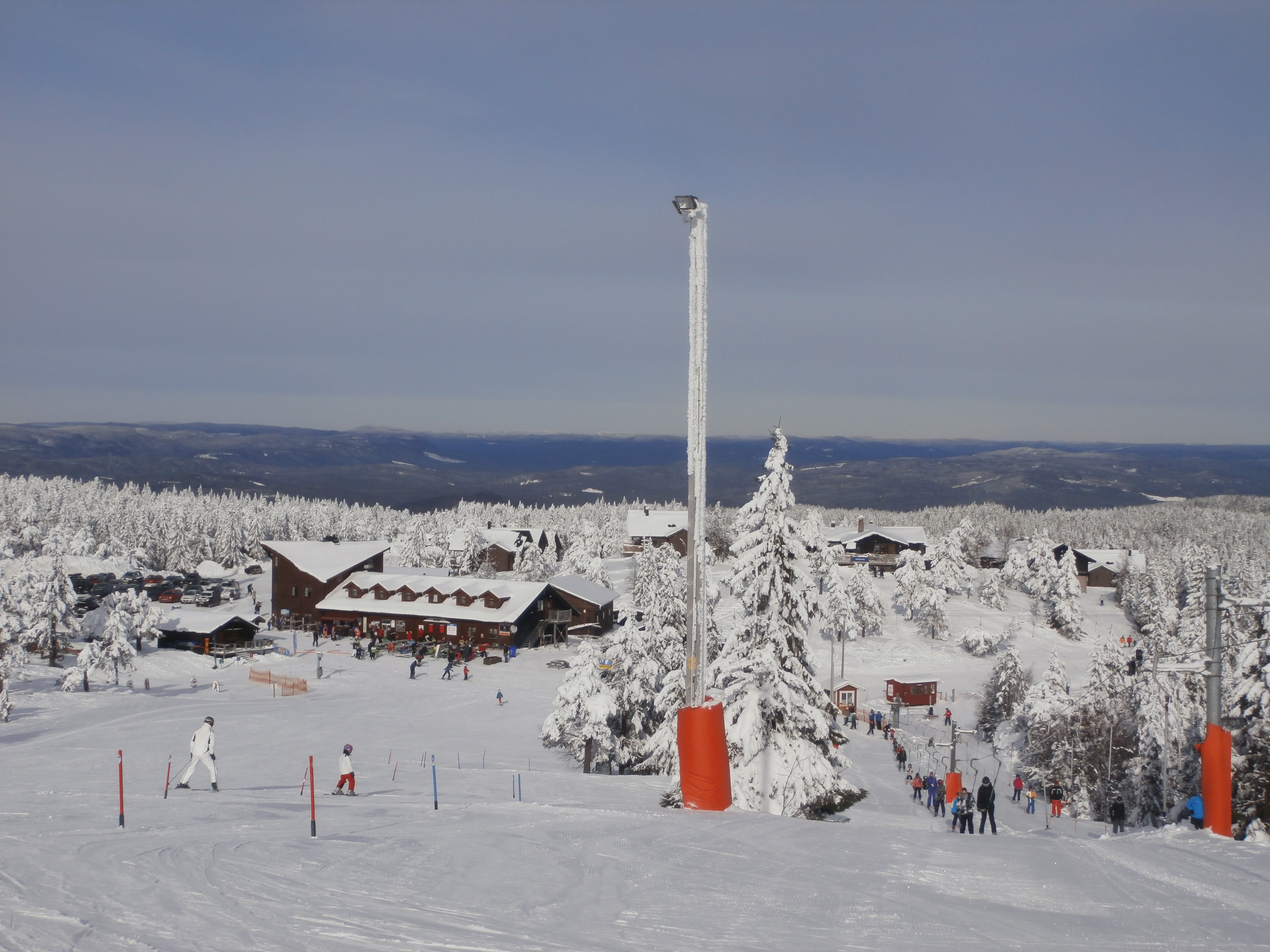 Hovfjället in februari 2013